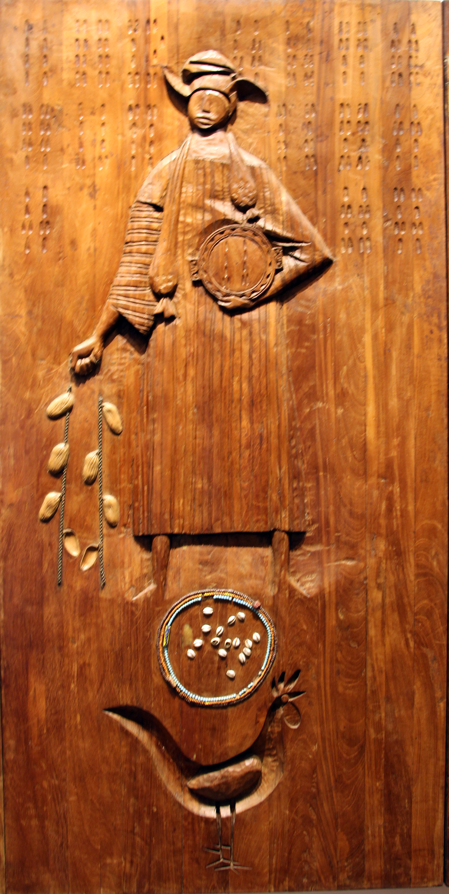 Candomblé nel Museu Afro-Brasileiro, Salvador